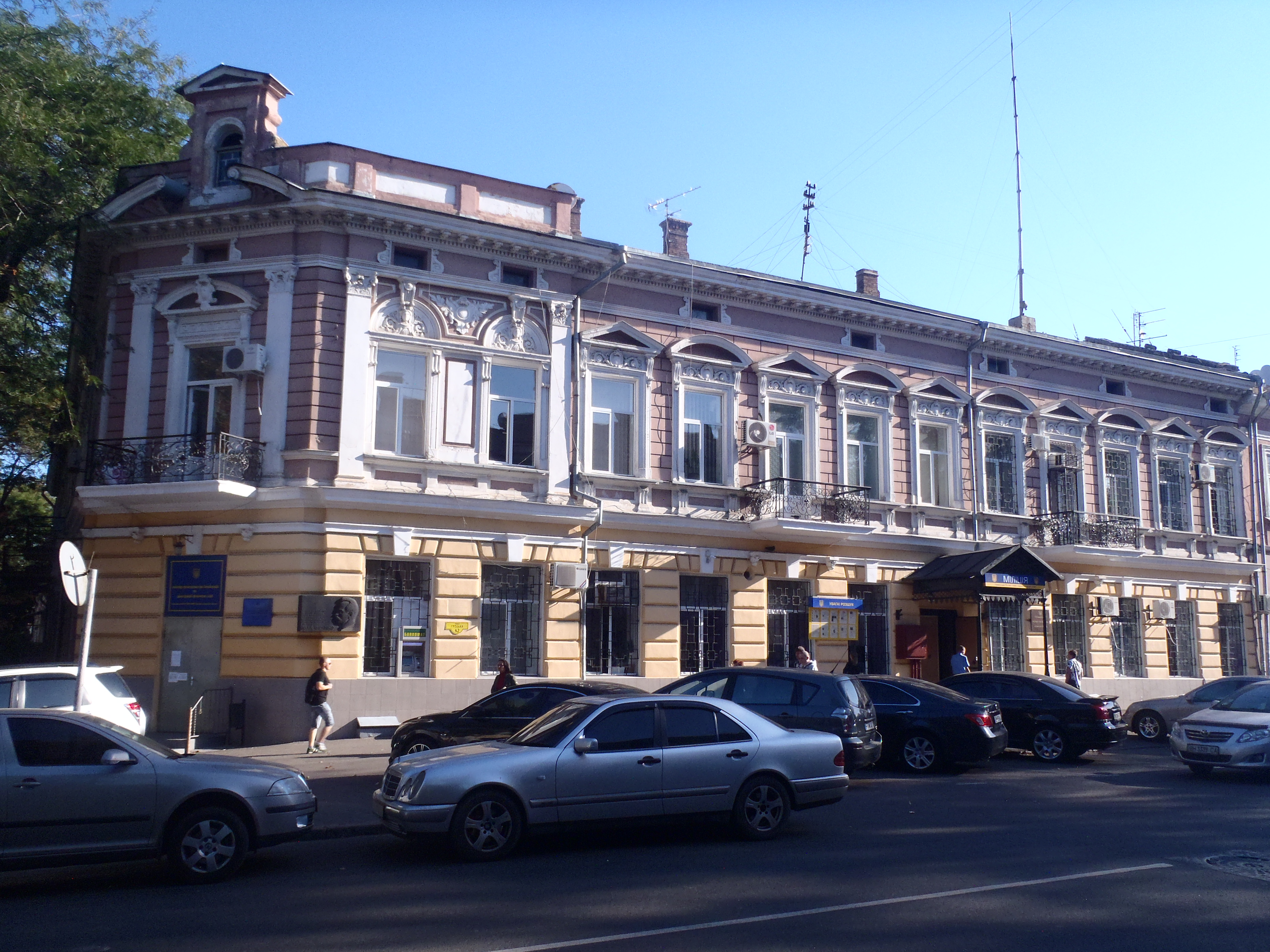 Будівля готелю “Версаль”,в якому у 1909 р. жив І.Я. Франко – український письменник 1894 рік